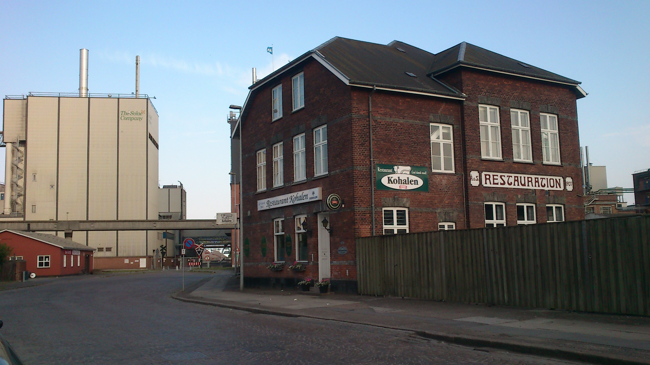 Restaurant Kohalen på Aarhus Havn